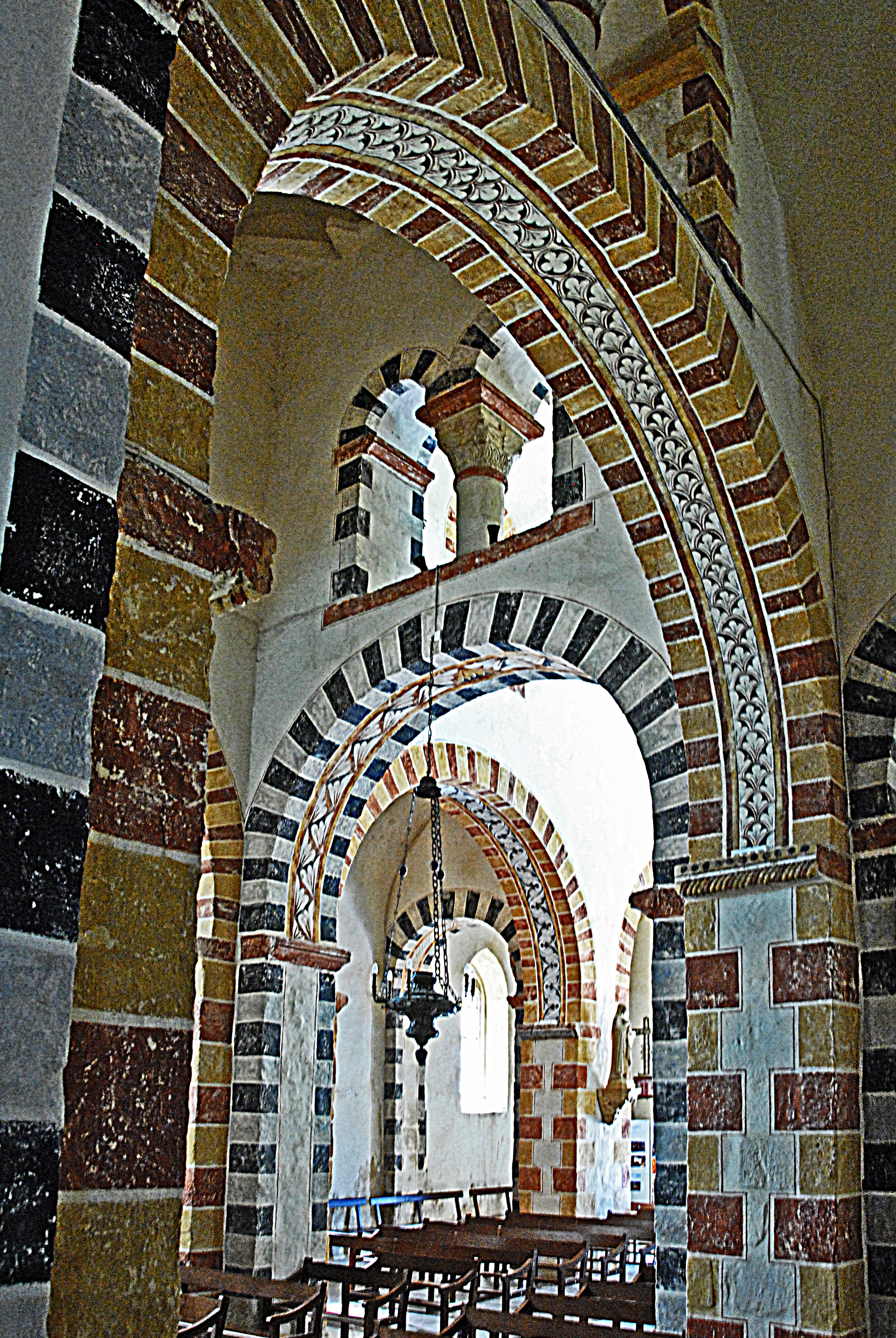 St.-Jean Glaine-Montaigut; Vierung, aus nördl. Querhausarm